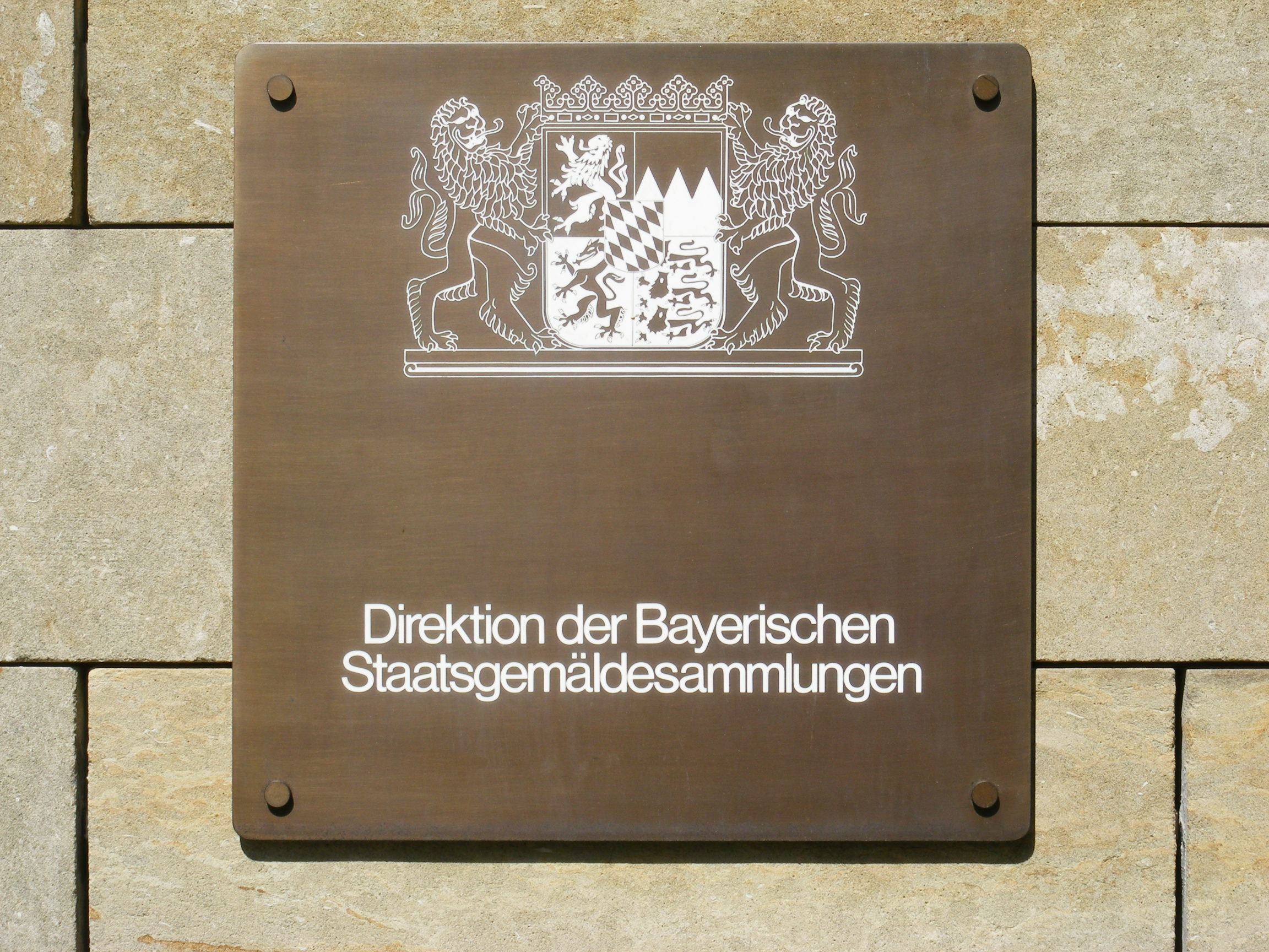 Munich, Barer Str 29